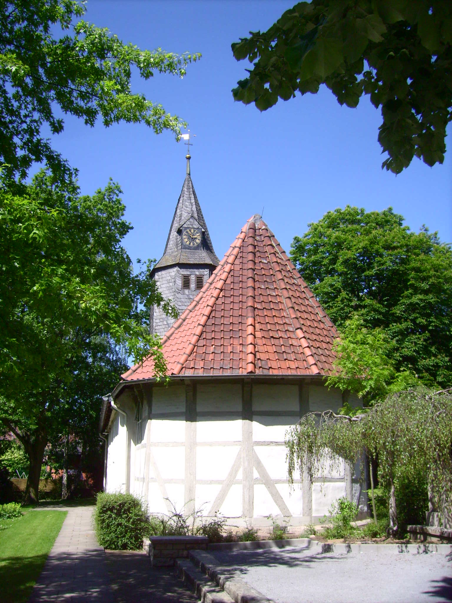 Sicht von Osten